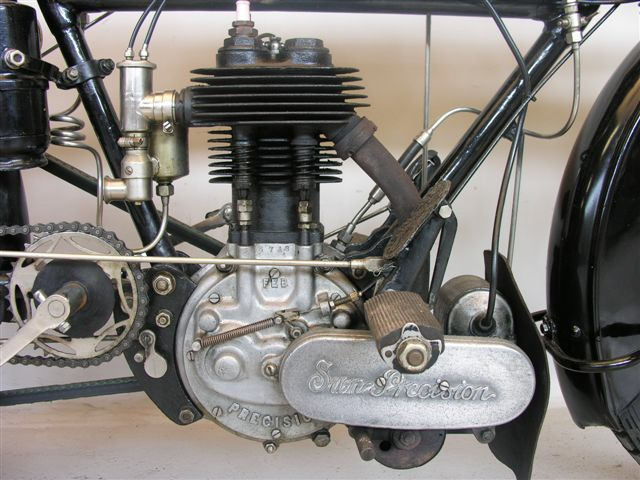 Deze Precision 500 cc zijklepmotor was voorzien van het opschrift "Sun-Precision". Hij was dan ook geleverd aan het - om de hoek gevestigde - merk Sun.